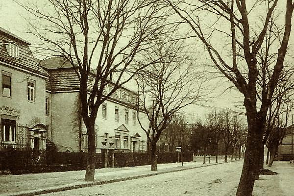 Gebäude der Gartenbauschule von Dr. Elvira Castner in Marienfelde bei Berlin, 1910